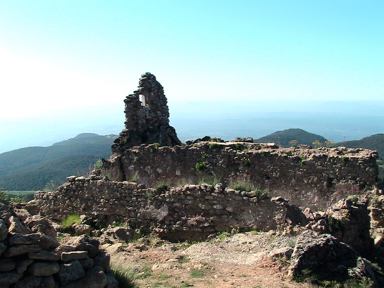 Runes de l'antic Santuari dels Tossals, al cap de la Serra homònima This is a a photo of a natural area in Catalonia, Spain, with id: ES510187